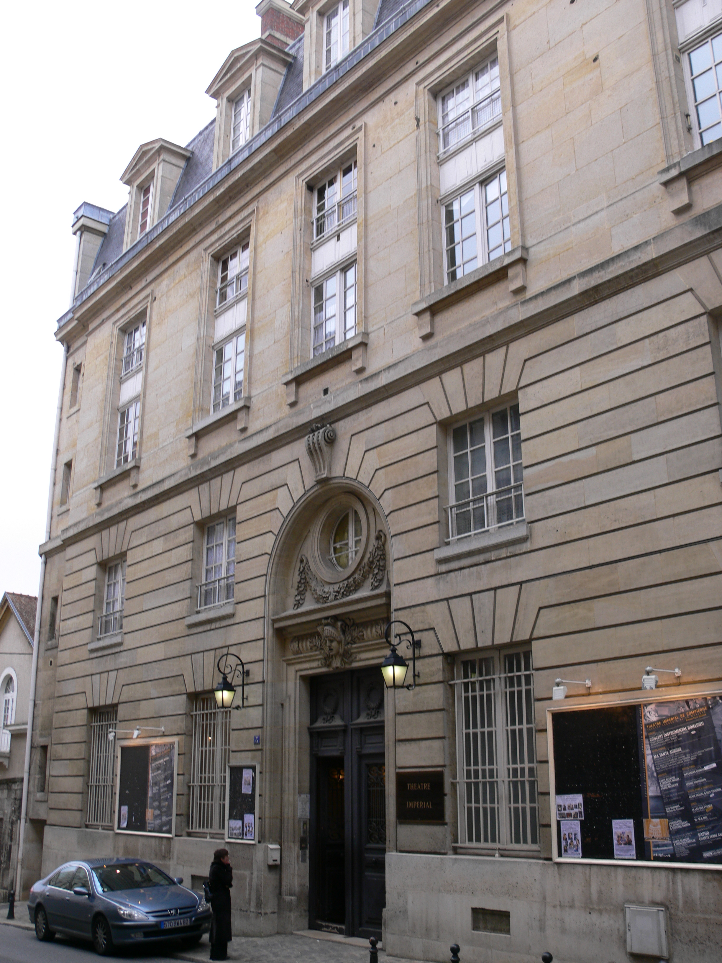 Compiègne, France: Théâtre Impérial de Compiègne